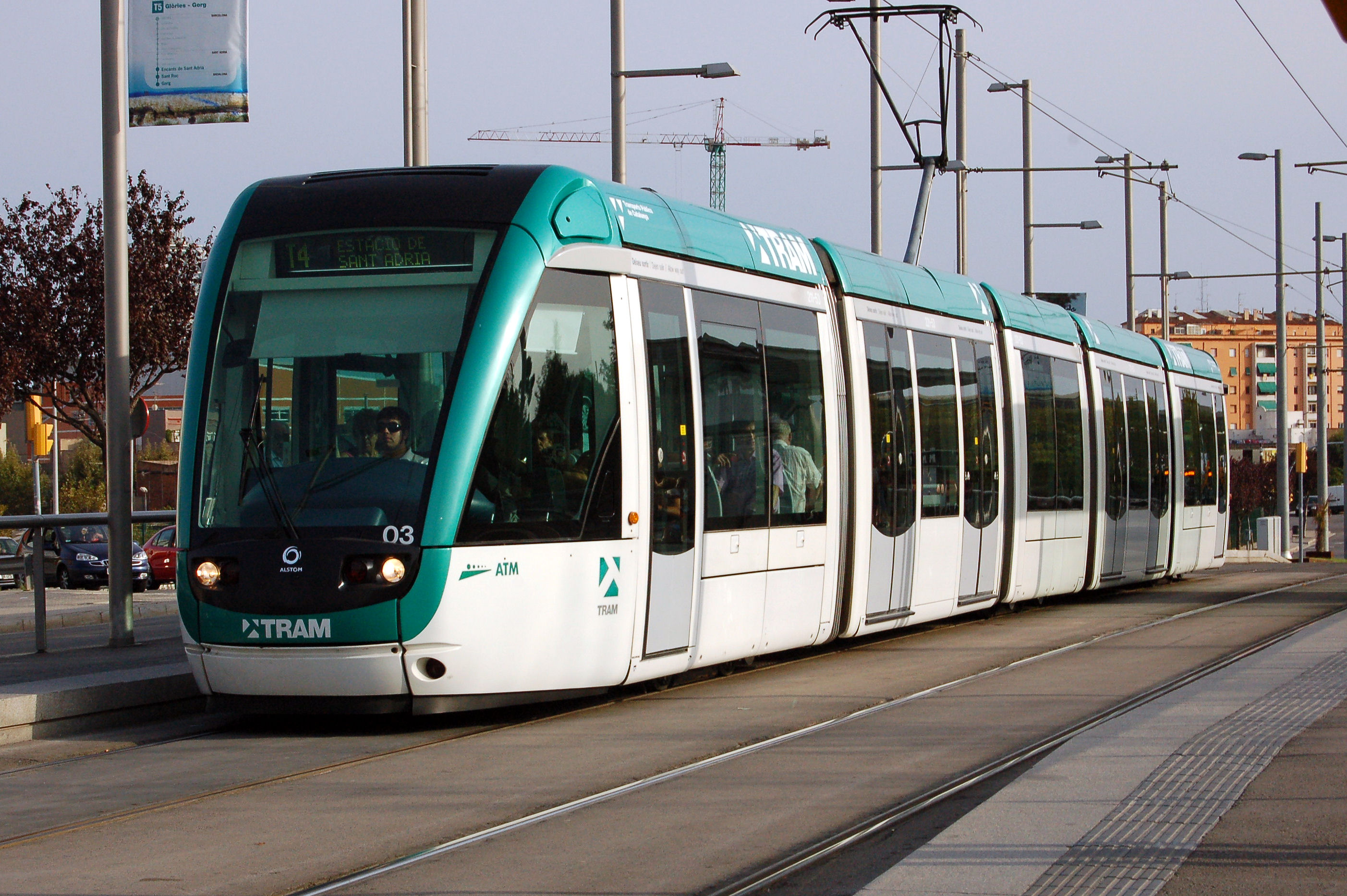 Tramway de Barcelone (Catalogne, Espagne).